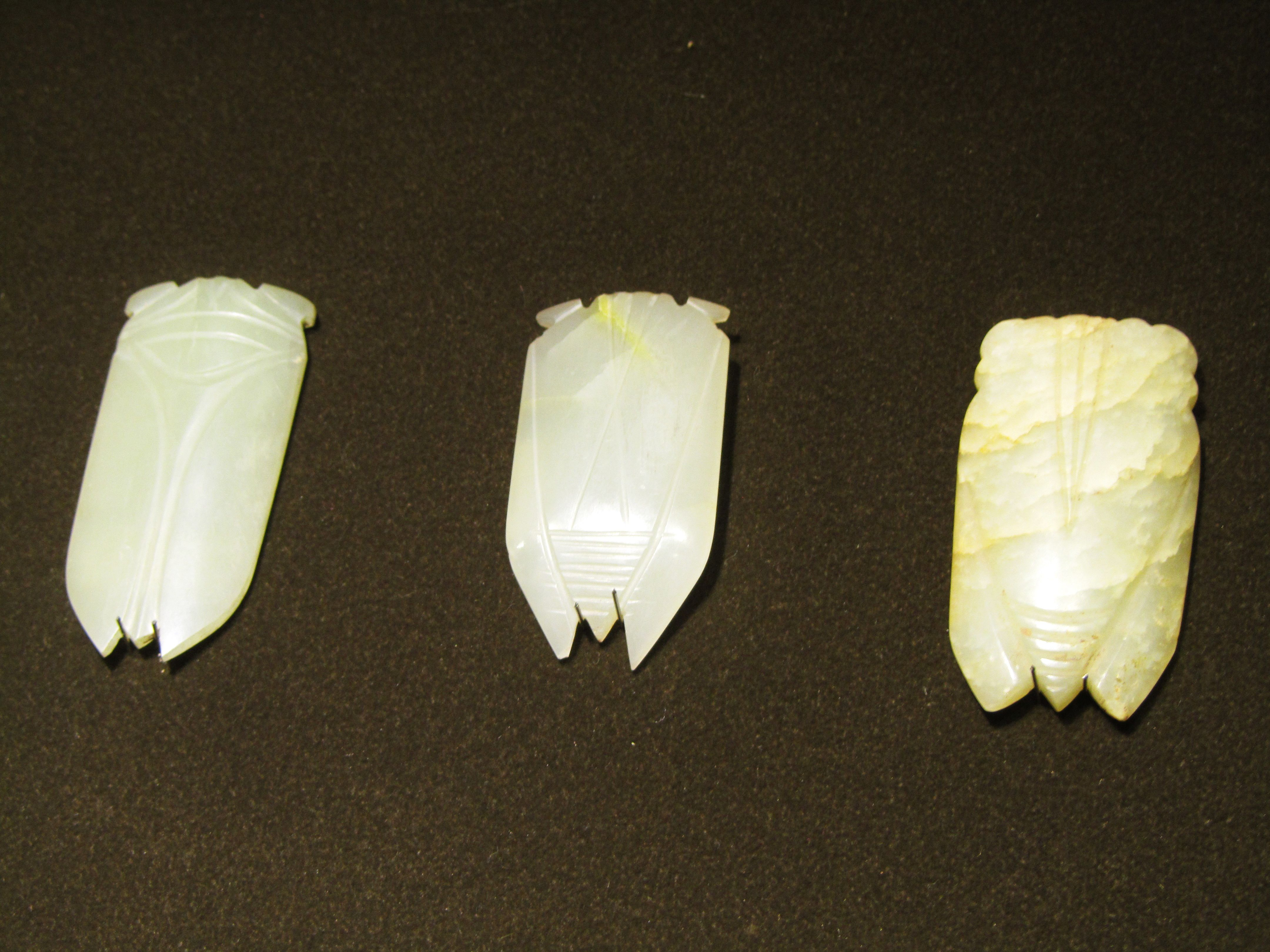 西汉蝉形玉唅，自左至右分别从咸阳市渭阳镇塔尔坡征集/周陵镇石羊店村征集/马庄镇直布村征集。